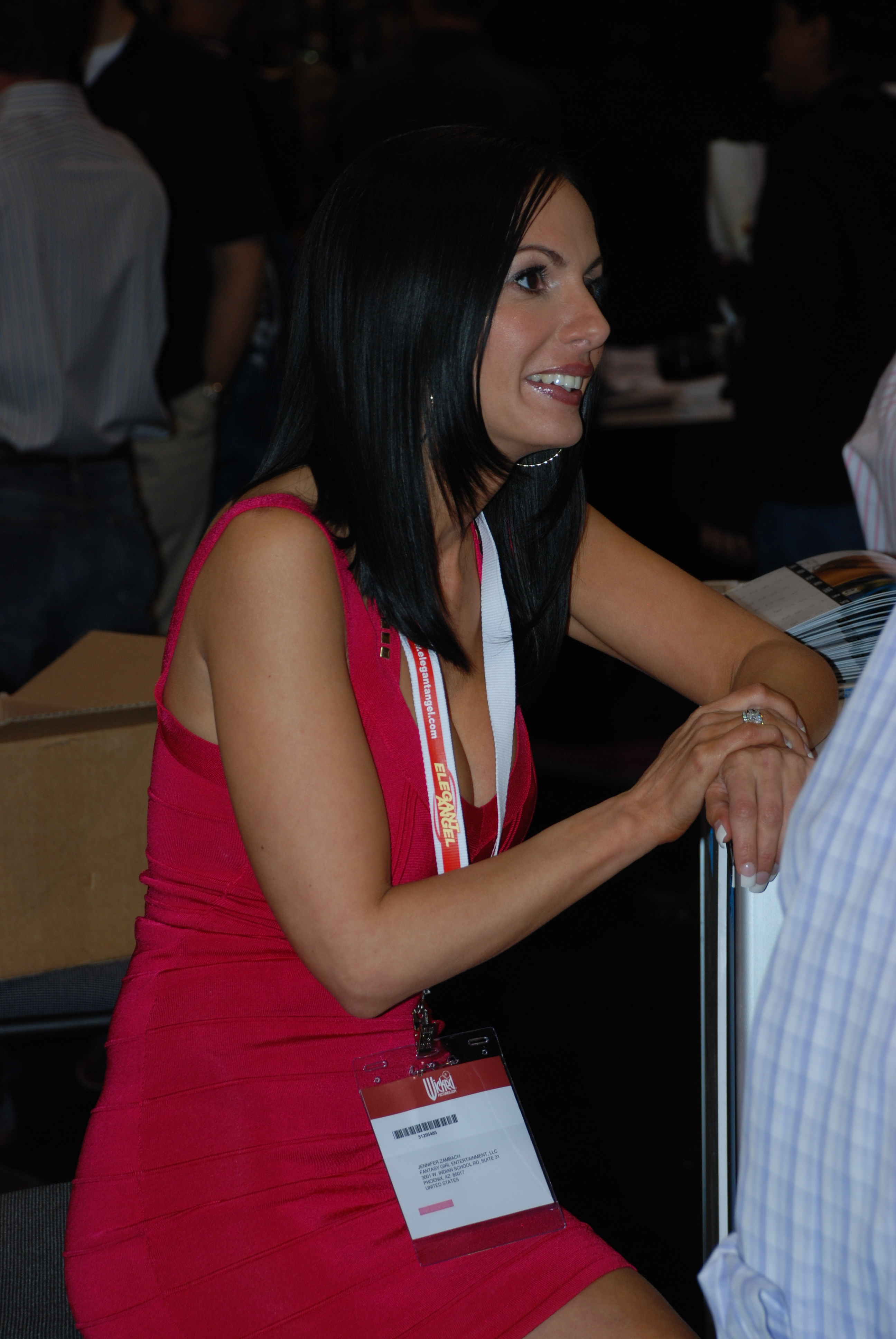 Catalina Cruz at AEE2009